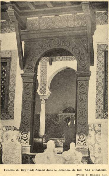 Caveau du bey de Constantine, Ahmed bey, dans le cimetière de la mosquée Sidi Abderrahmane Et Thaâlibi à Alger.